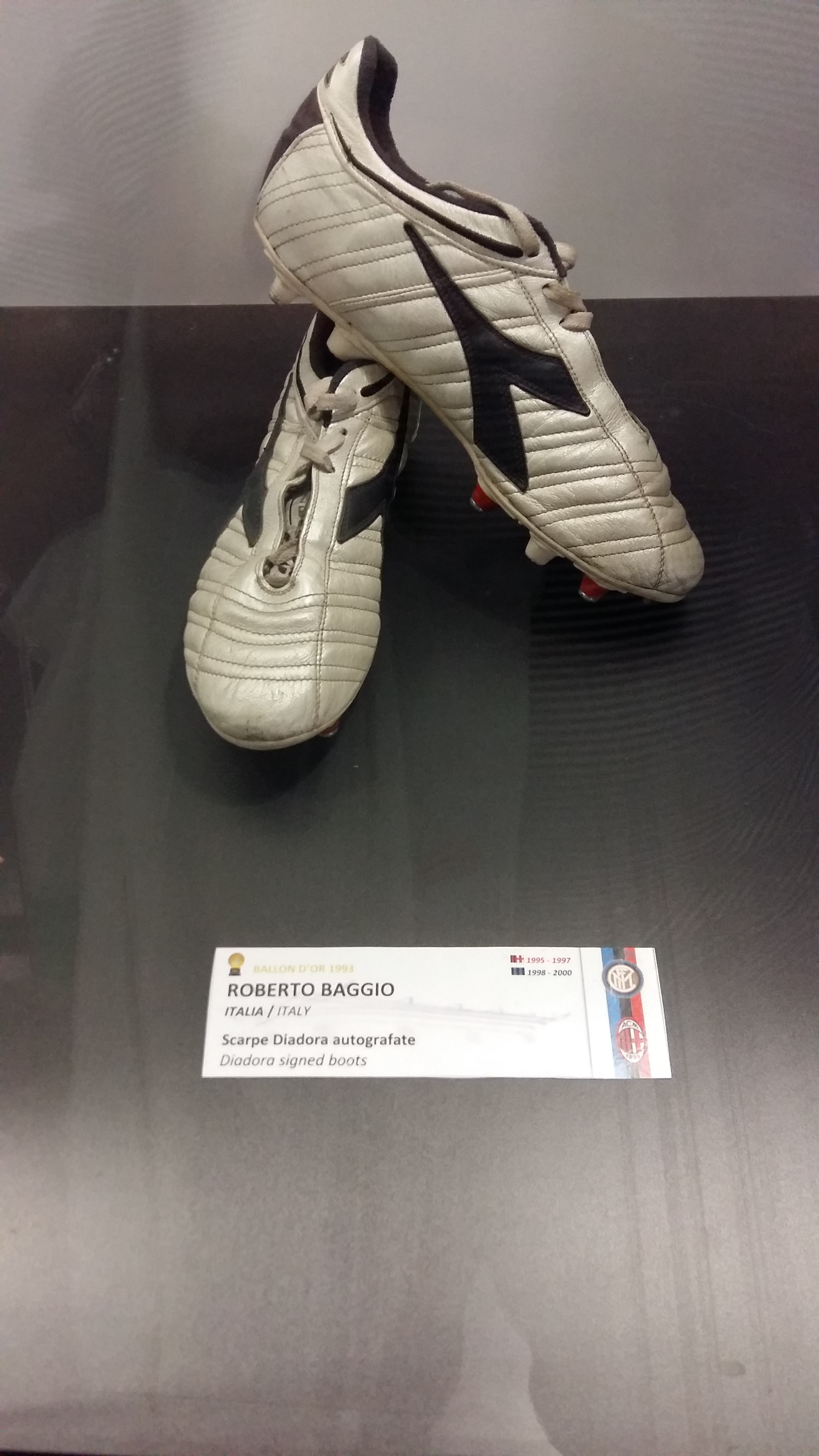 Бутсы Роберто Баджо в музее Сан-Сиро.